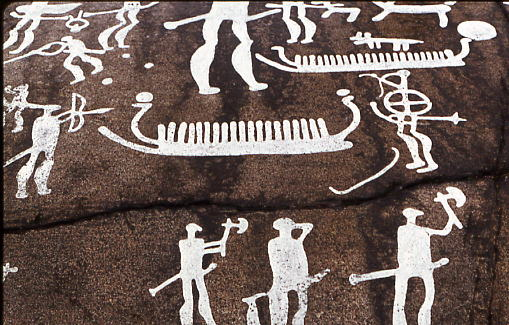 Gravure préhistorique de la région de Tanum